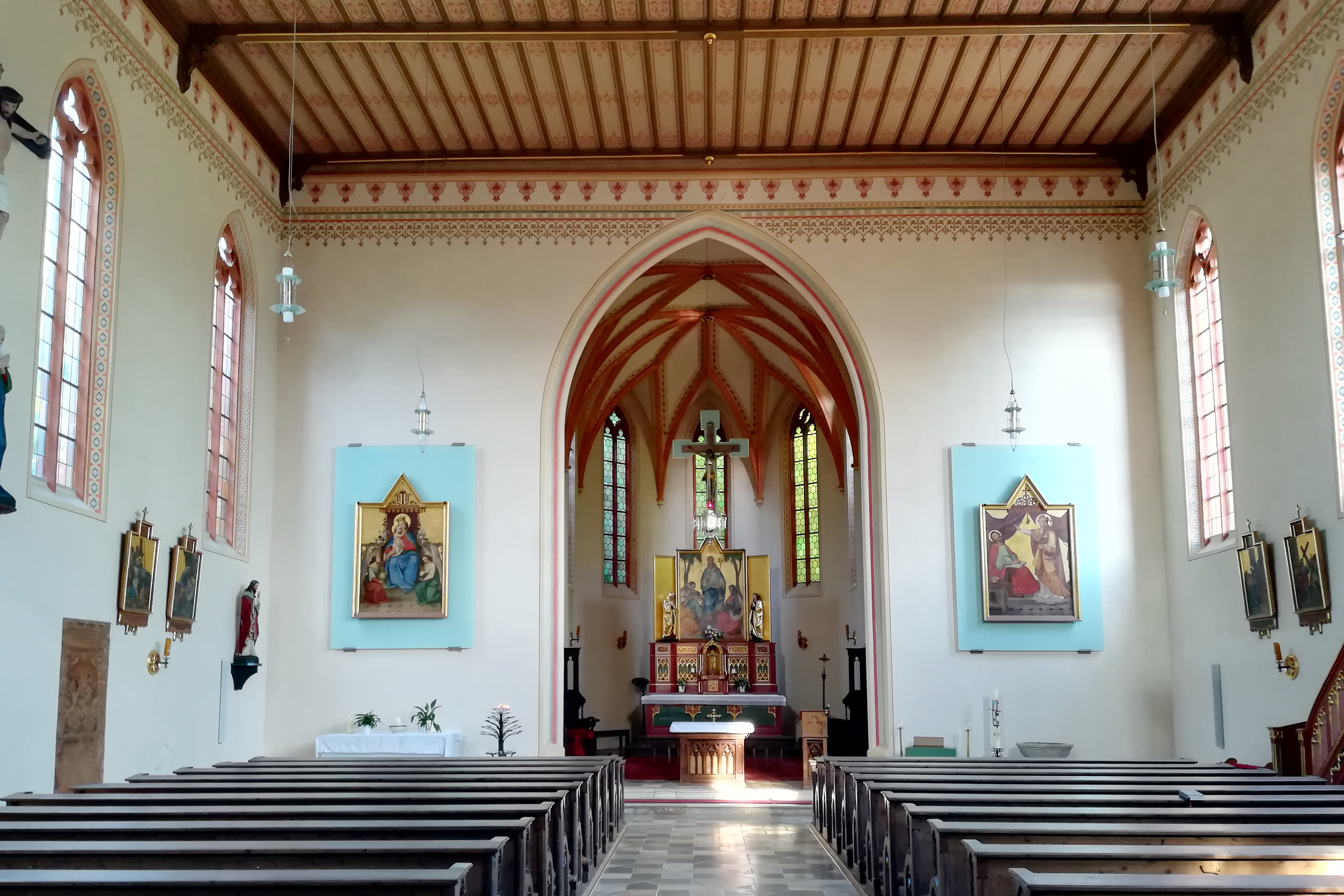 Die römisch-katholische Pfarrkirche St. Nikolaus in Bad Abbach ist ein neugotischer Kirchenbau, der in den Jahren 1849 bis 1852 anstelle eines barocken Vorgängerbaus errichtet wurde.